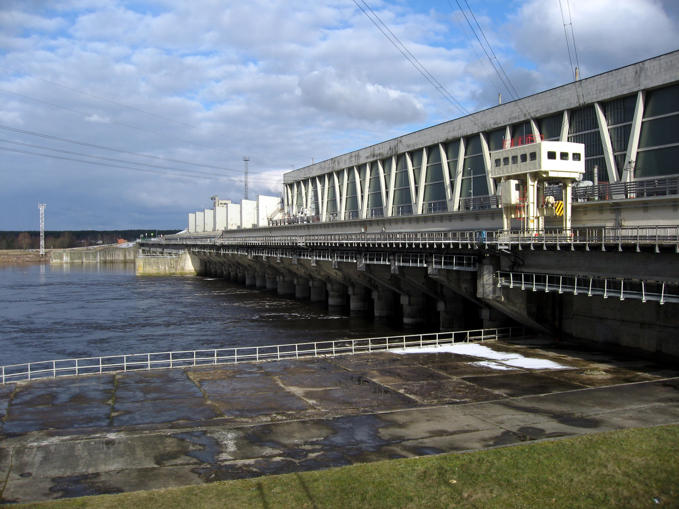 Rīgas HES